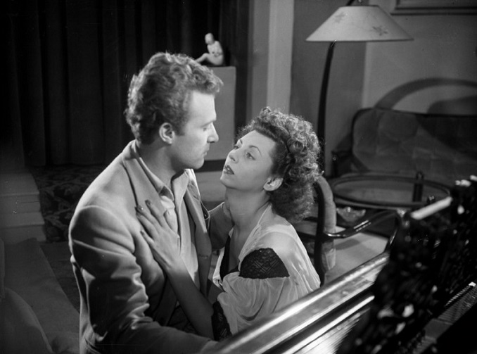 Foto di scena del film "Nennella" con Vera Rol e Piero Palermini